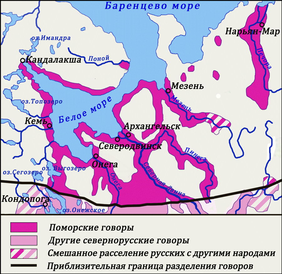 Поморские говоры На основе данных диалектологической карты 1915 года: Захарова К. Ф., Орлова В. Г. Диалектное членение русского языка. М.: Наука, 1970. 2-е изд.: М.: Едиториал УРСС, 2004 Русские. Монография Института этнологии и антропологии